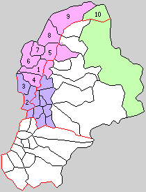 長野県下水内郡の町村。